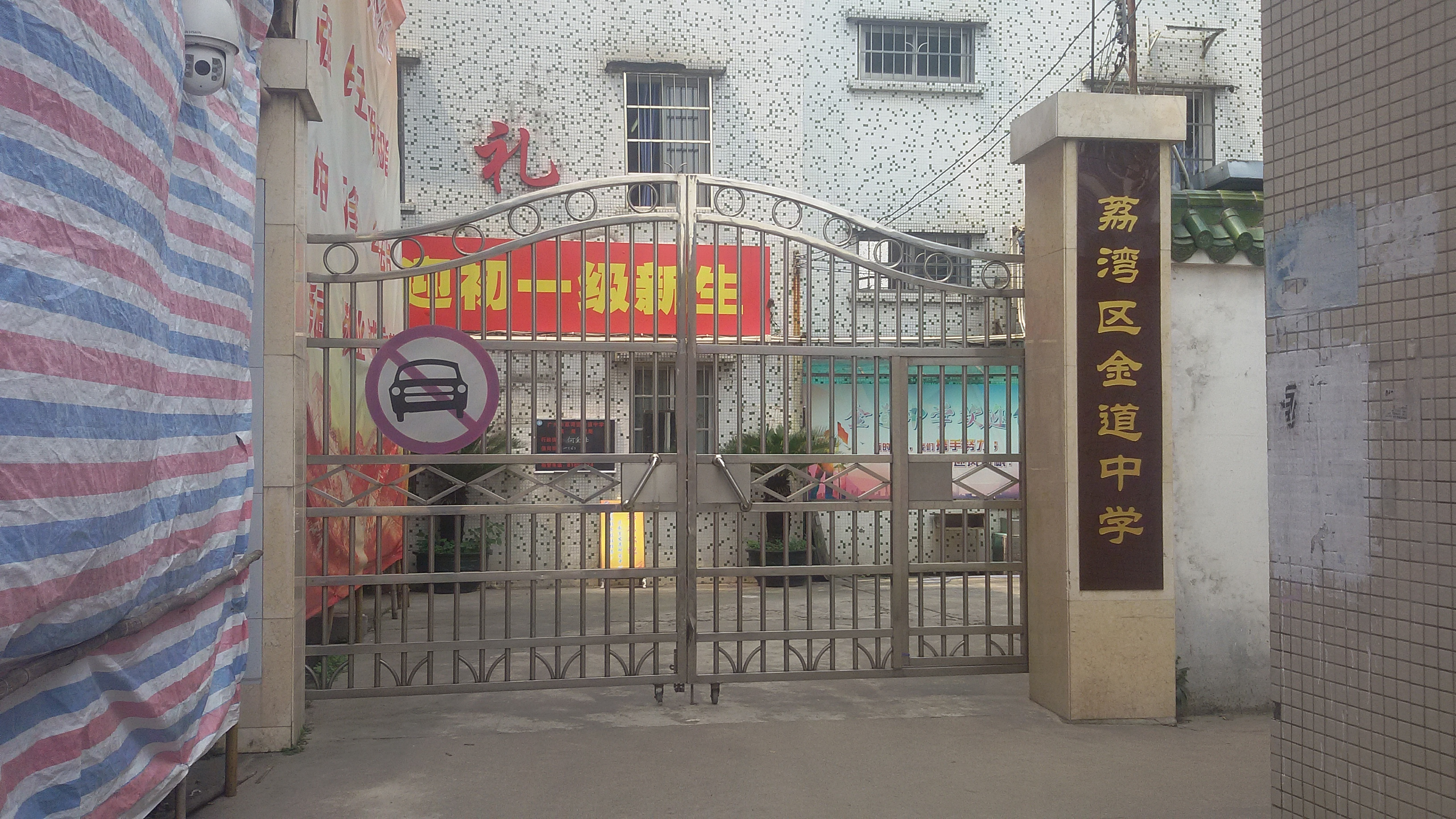 粵語: 荔灣區金道中學嘅後門